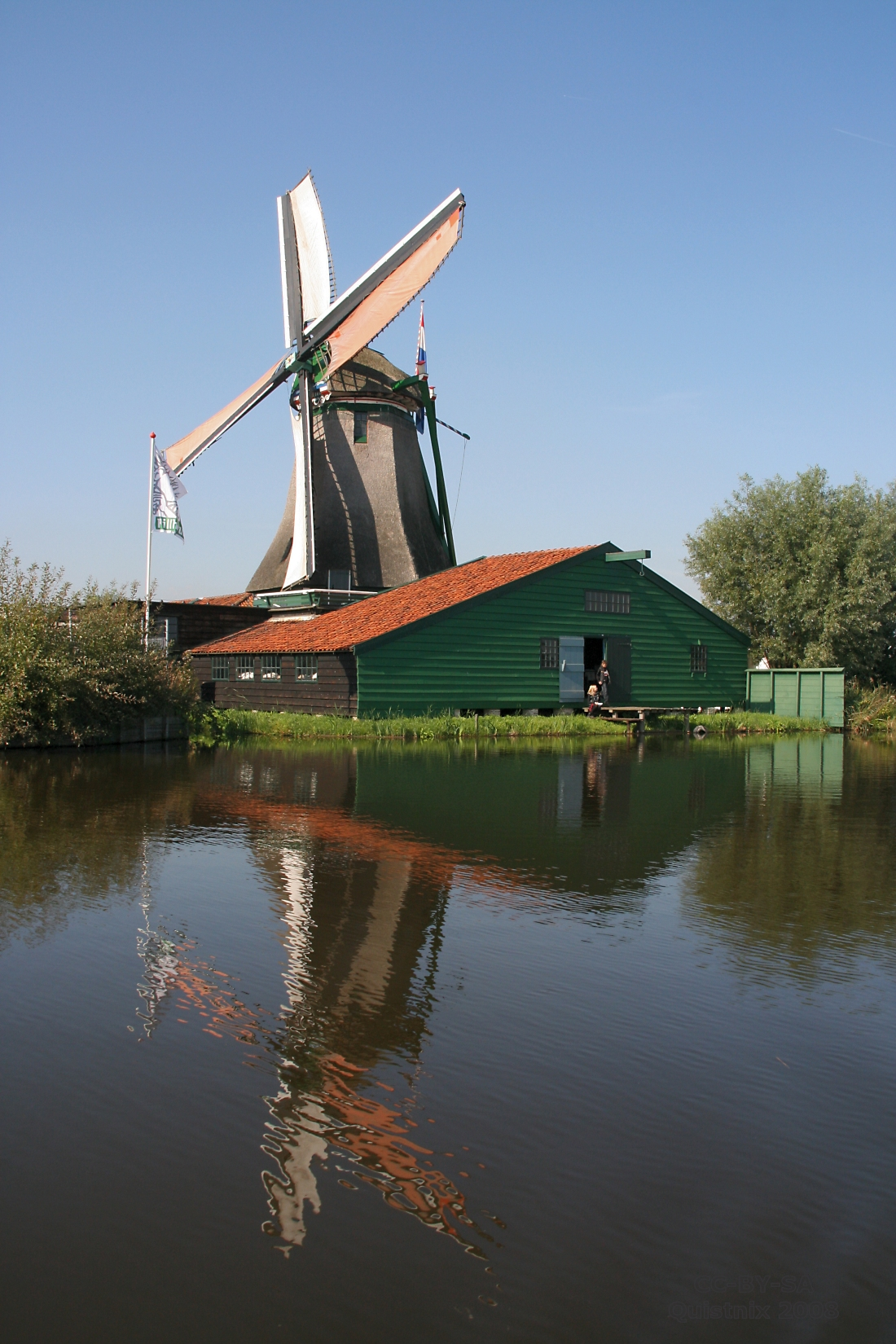 Westzaan: papiermolen De Schoolmeester, vanaf het water gezien